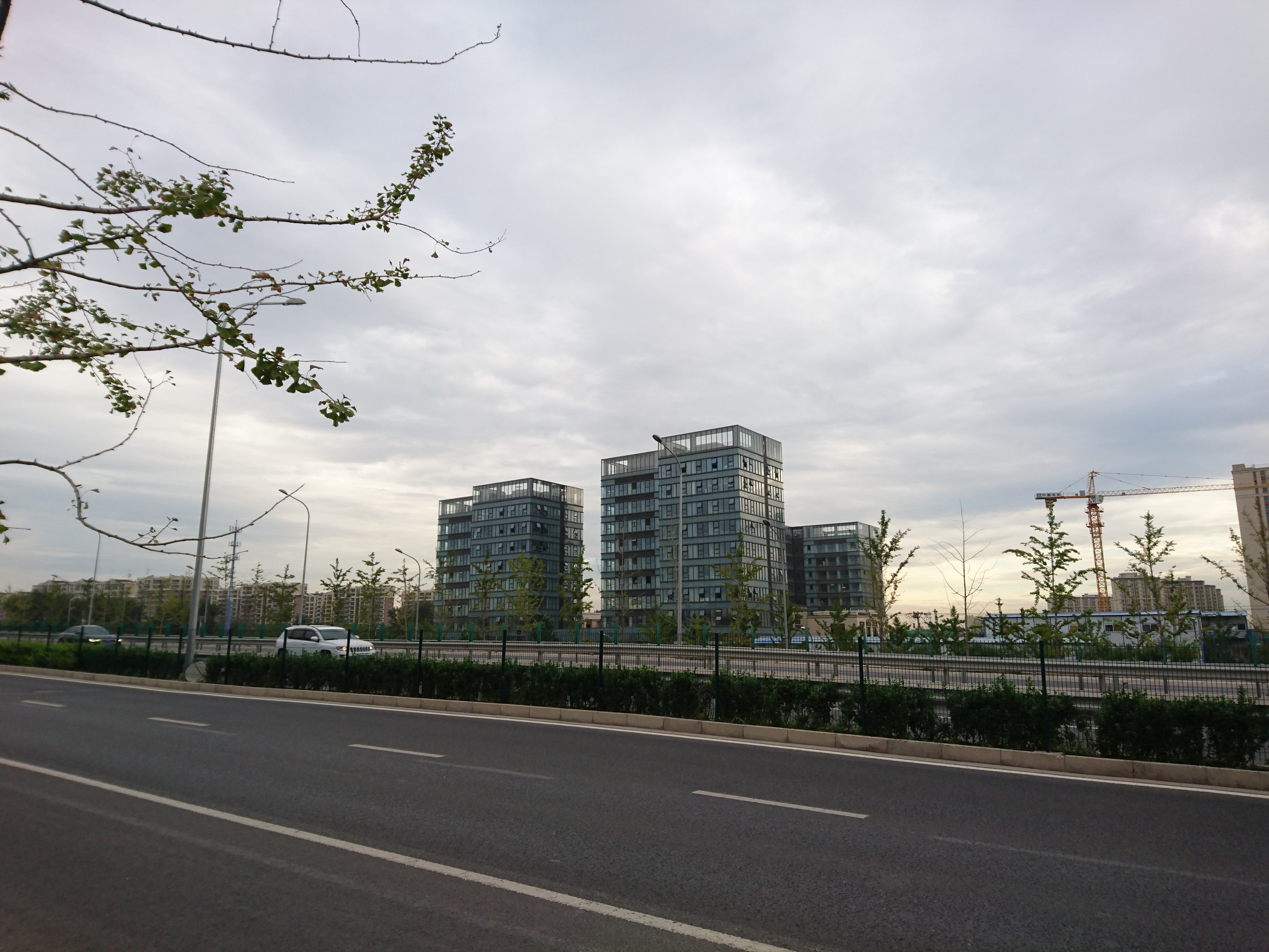 京良路(大興区と結び)